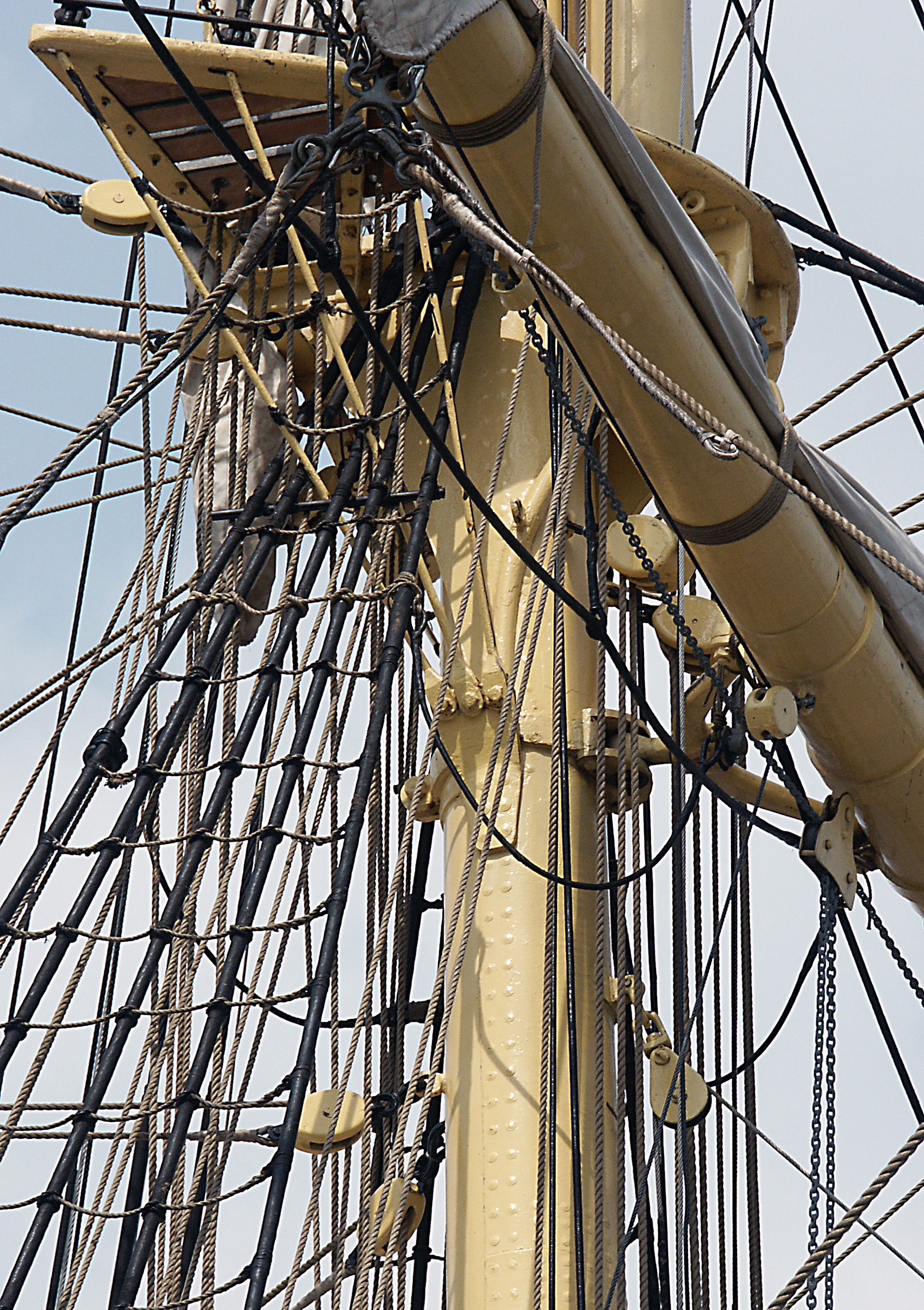 Georg Stage Schulschiff